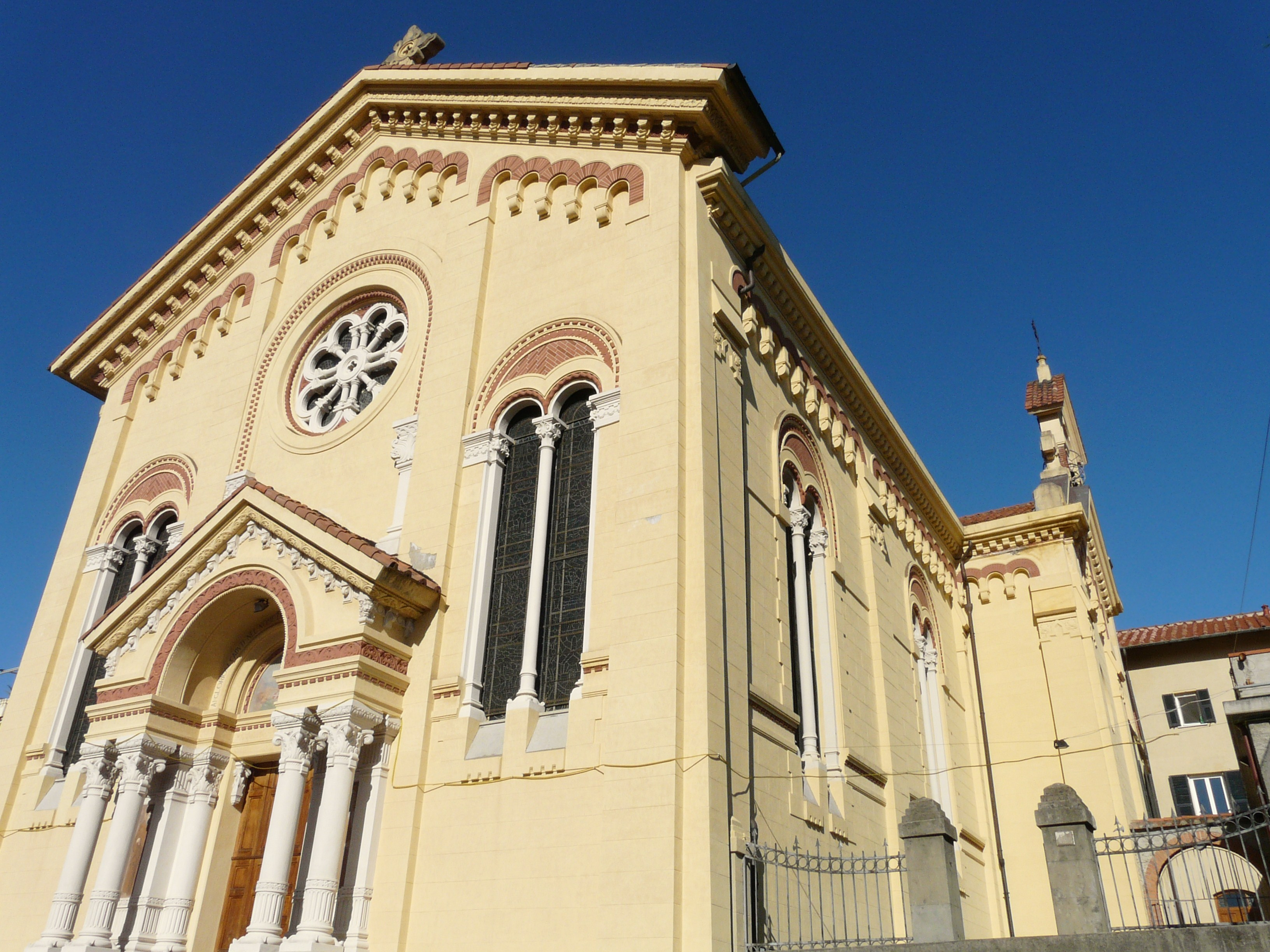 Chiesa del Sacro Cuore di Gesù, La Spezia, Liguria, Italia